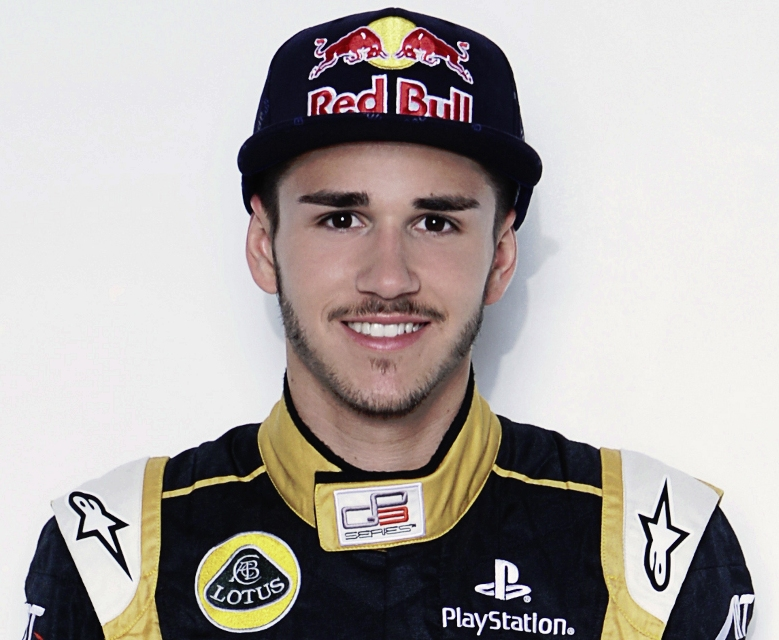 Daniel Abt, GP3-Pilot, Saison 2012, Motorsport, Formel